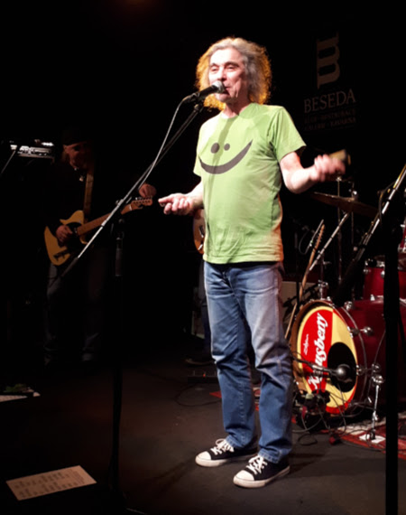 Martin Kraus v Malostranské besedě